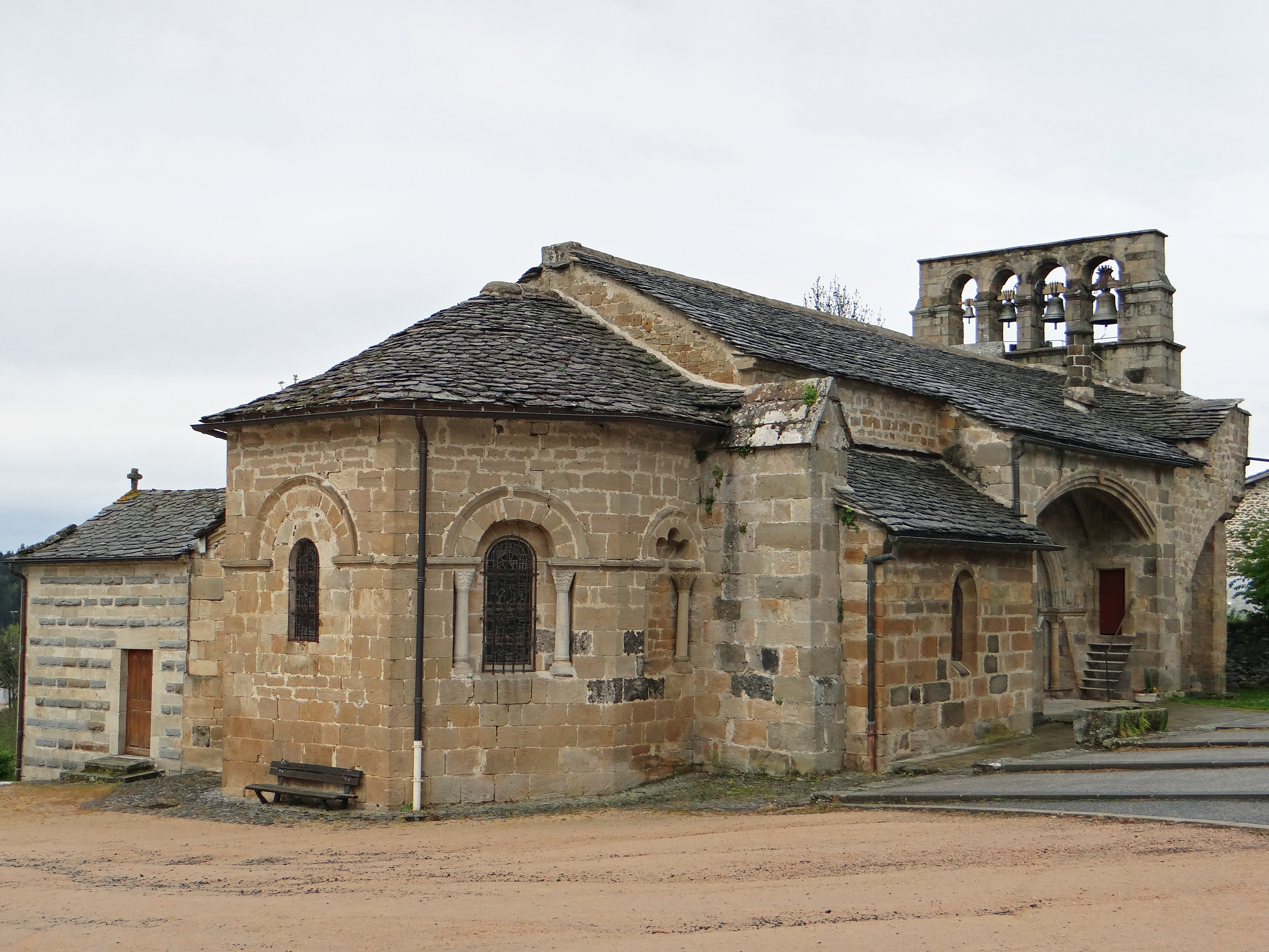 Saint-Pierre-Eynac - Église Saint-Pierre - Vue du chevet et du clocher